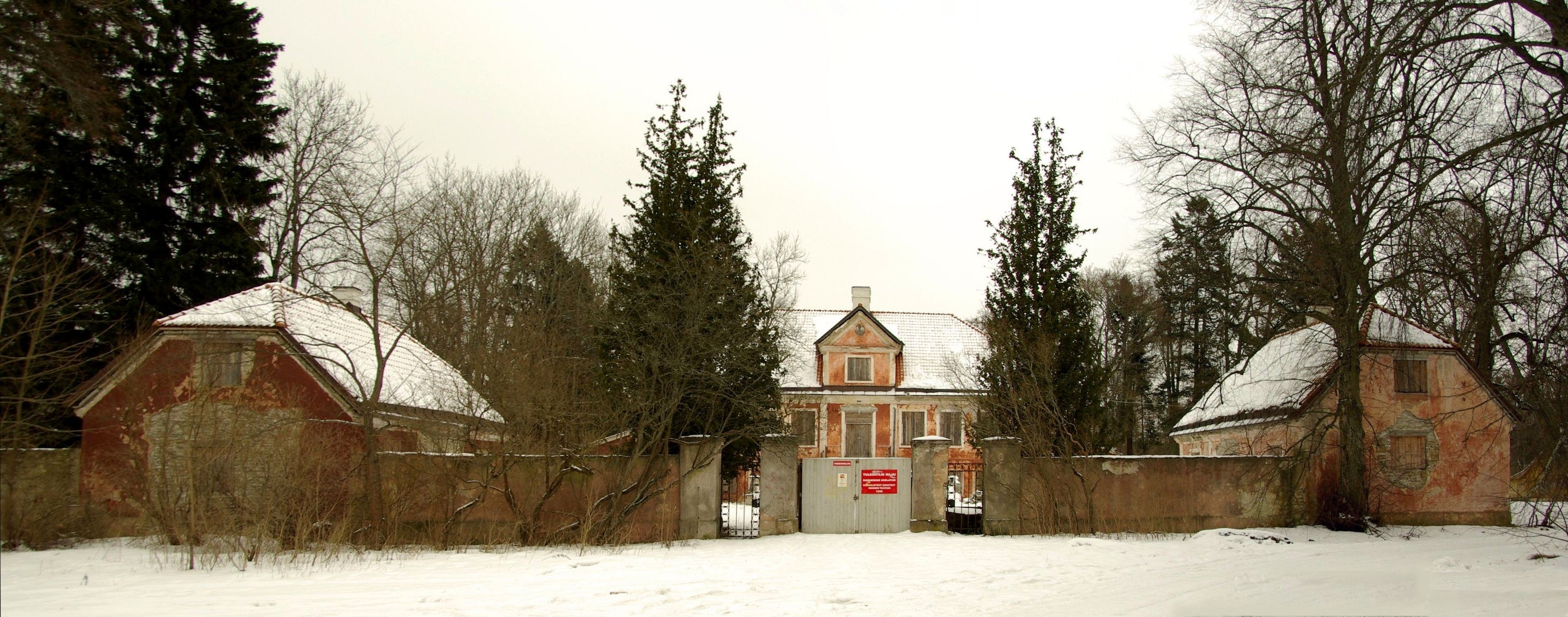 asub Tallinnas Pirita jõe ääres